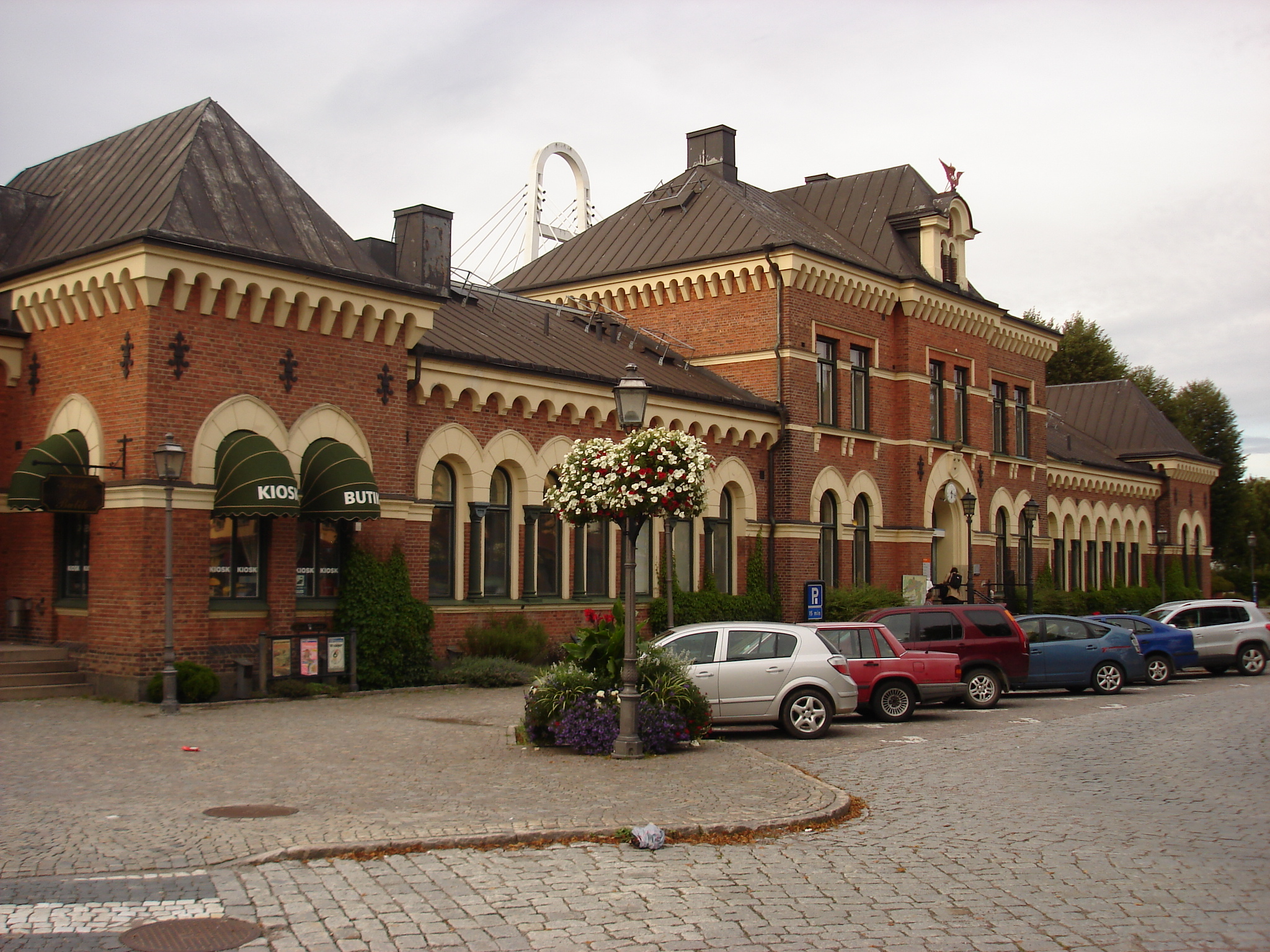 Sedd från utfarten mot Storgatan